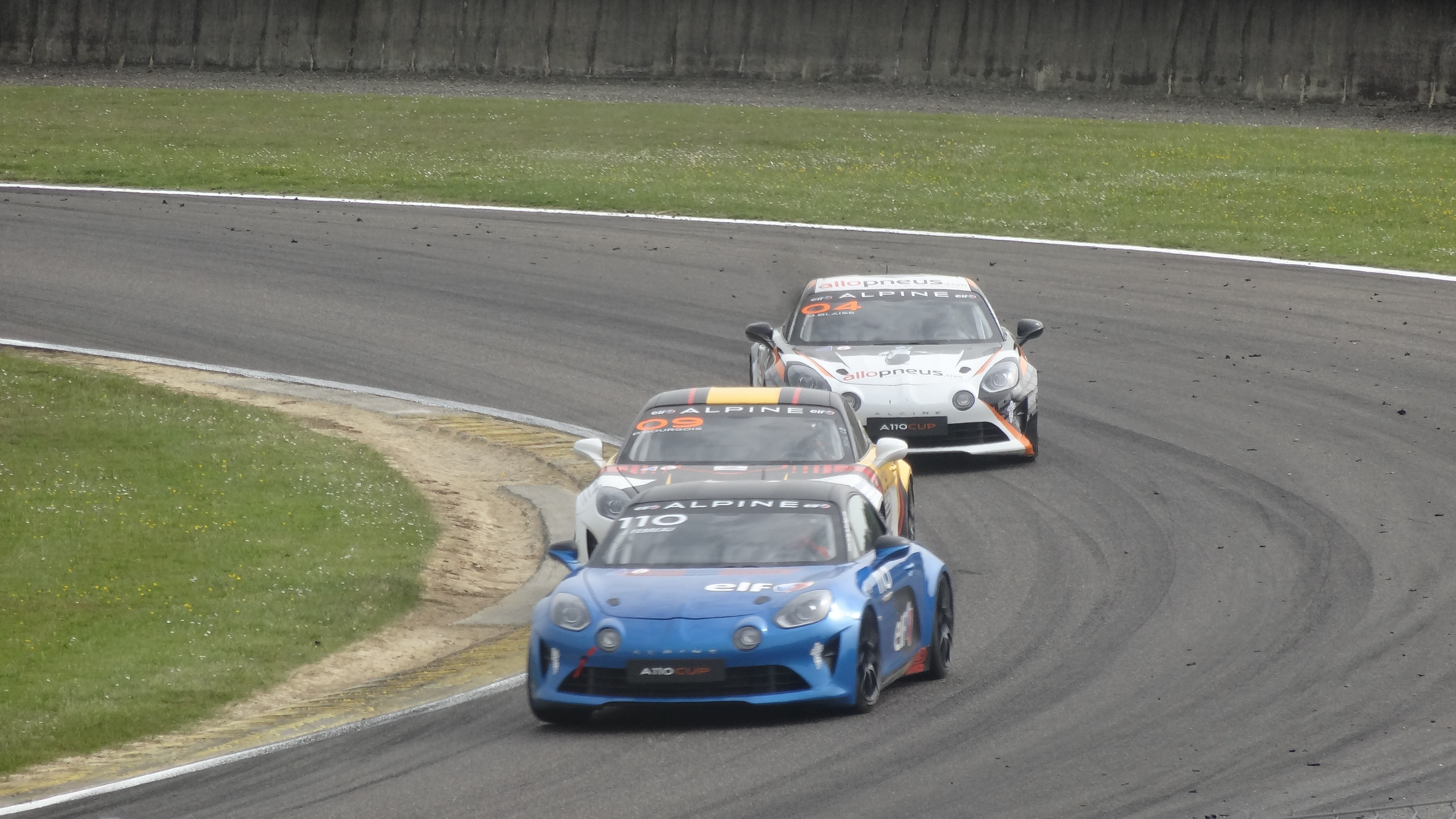 52e Coupes de Pâques (sport automobile), sur le Circuit Paul Armagnac à Nogaro (Gers) : Alpine Elf Europa Cup - au premier plan, Julien Fébreau.